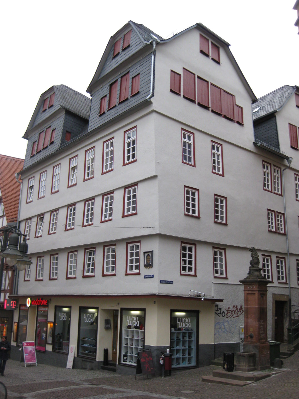 Ehemaliger Gasthof zum Bären ("Lutherhaus") in der Barfüßerstraße 48, Ecke Schneidersberg in Marburg. Dort soll Martin Luther 1529 übernachtet haben als er zum Religionsgespräch nach Marburg kam.